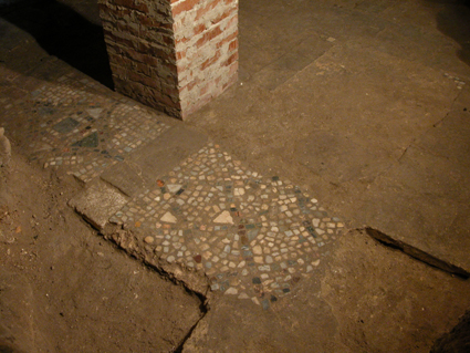 Siracuse, Catacombe de Sainte Lucia - Photographie du pavement en opus-tesselatum de la Région D.